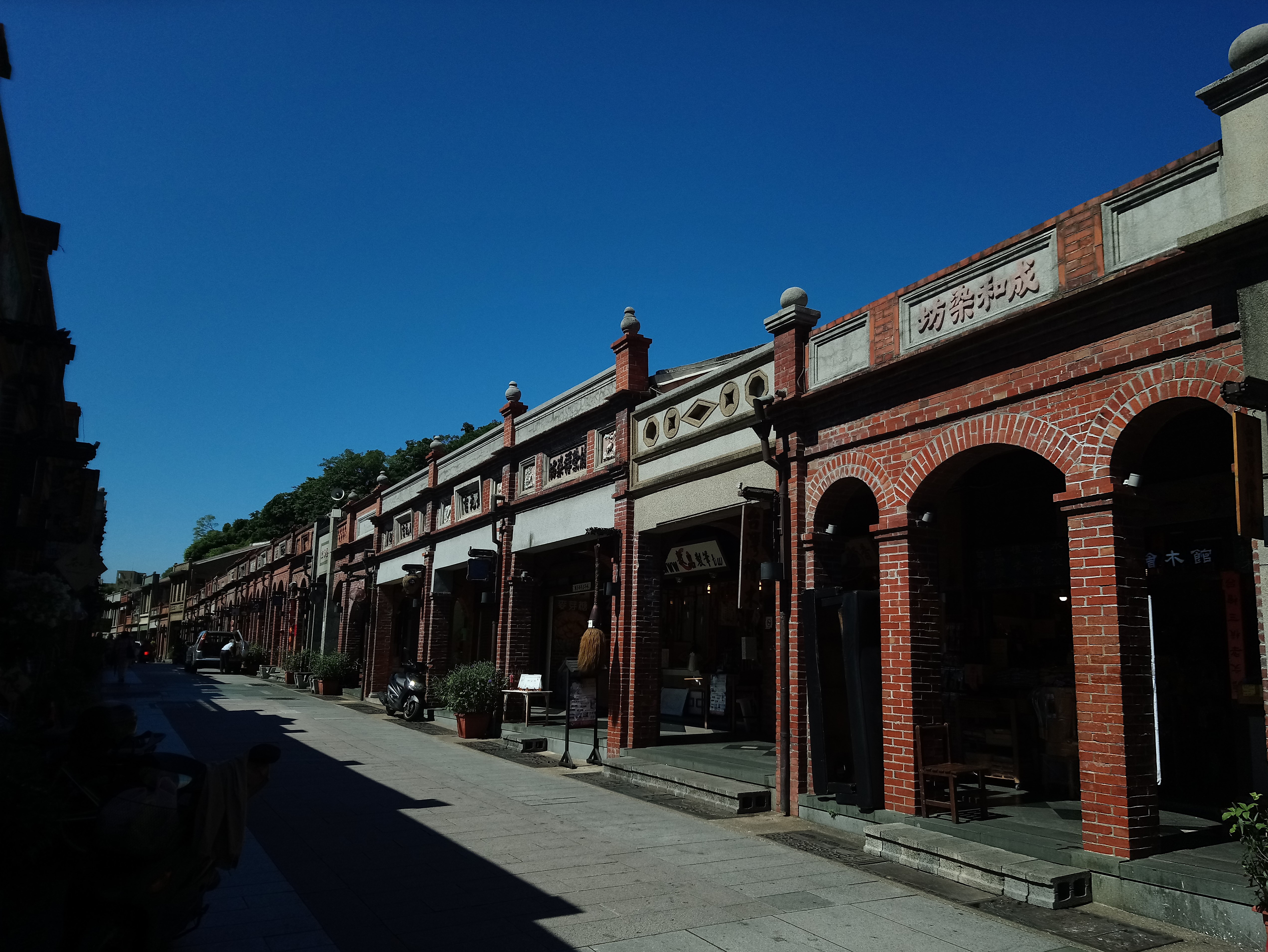 三峽老街金合記附近，新北市三峽區三峽里